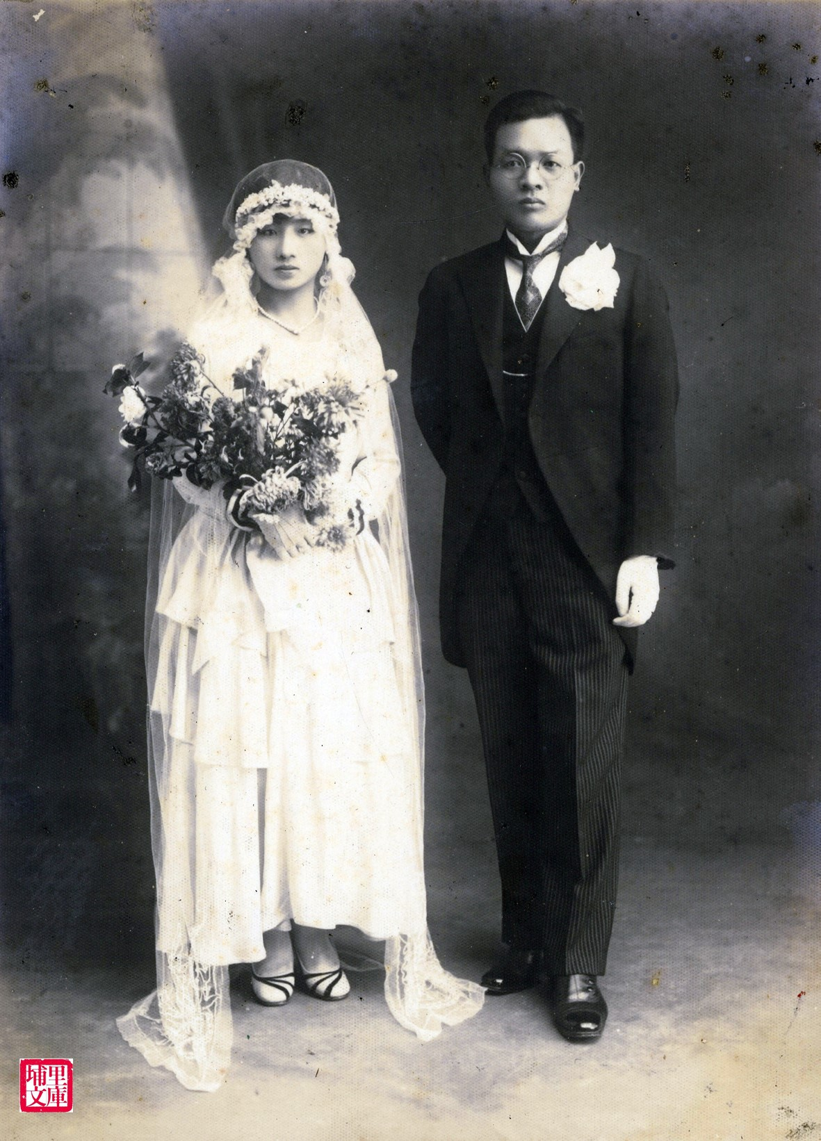 昭和8年，巫永昌醫師(右)與吳沛小姐結婚的合影，良緣天成，神仙美眷，是當時非常華麗的結婚照。